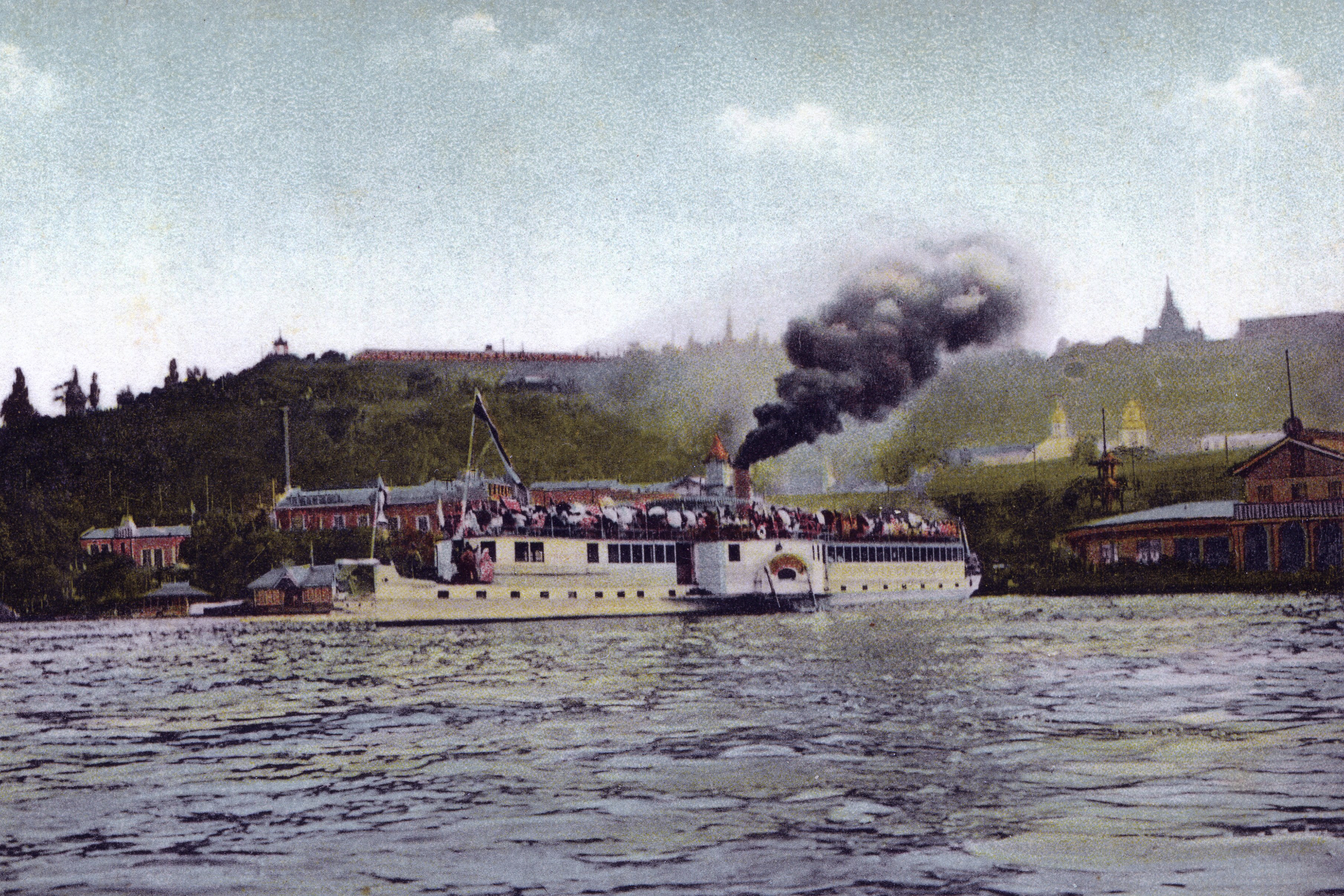 Пароплав до Китаєва (Київ)